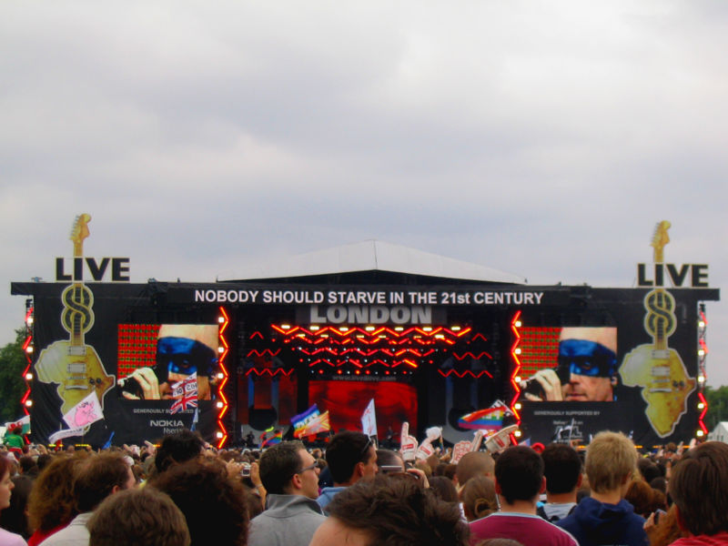 taken by: The Life of Pi(cco)'s להקת אר.אי.אם. מופיעה בקונצרט לייב 8 בלונדון, 2 ביולי 2005